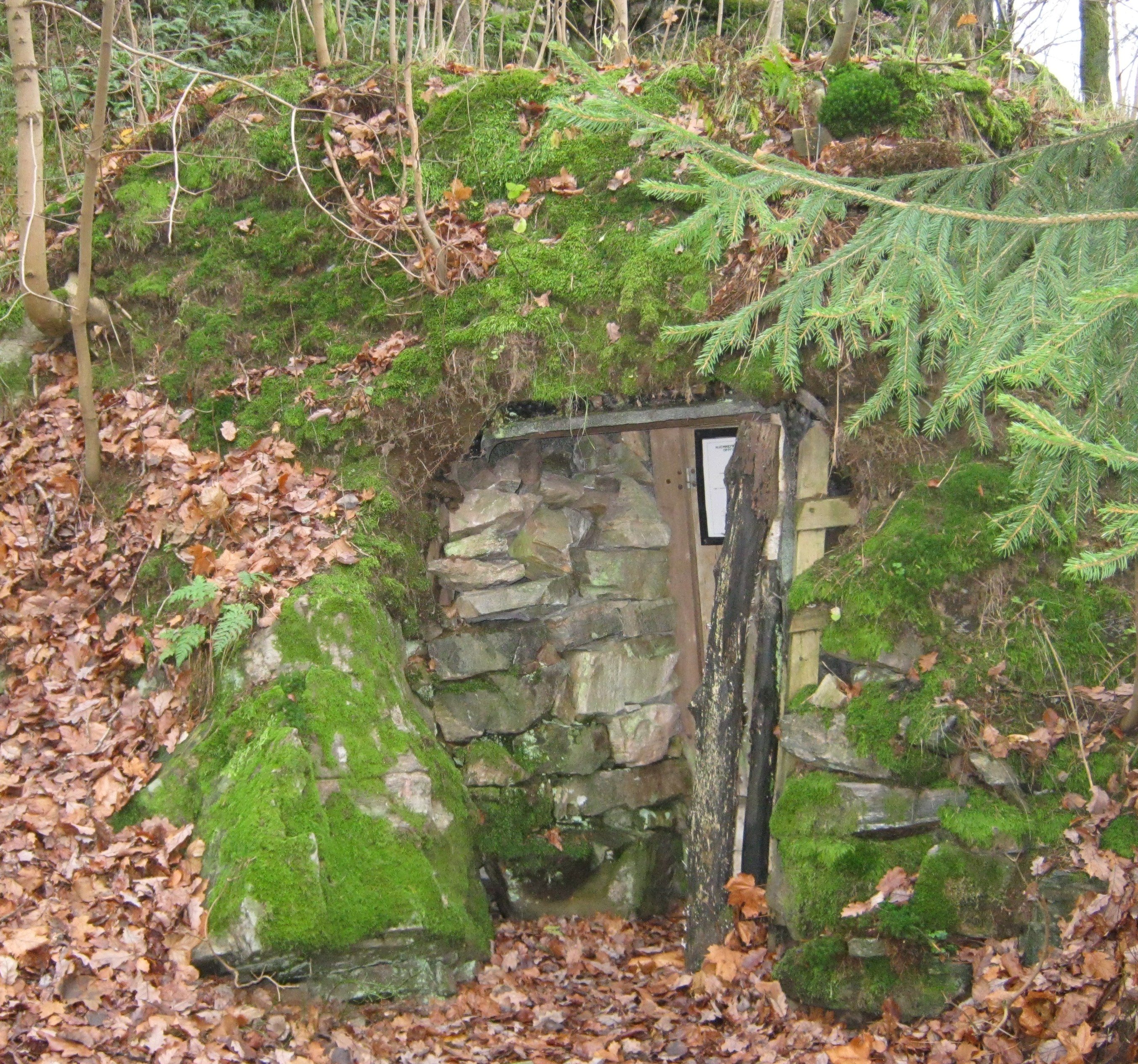 Vest-Agder-museet Kriistiansand: hytte benyttet av motstandsfolk under annen verdenskrig.